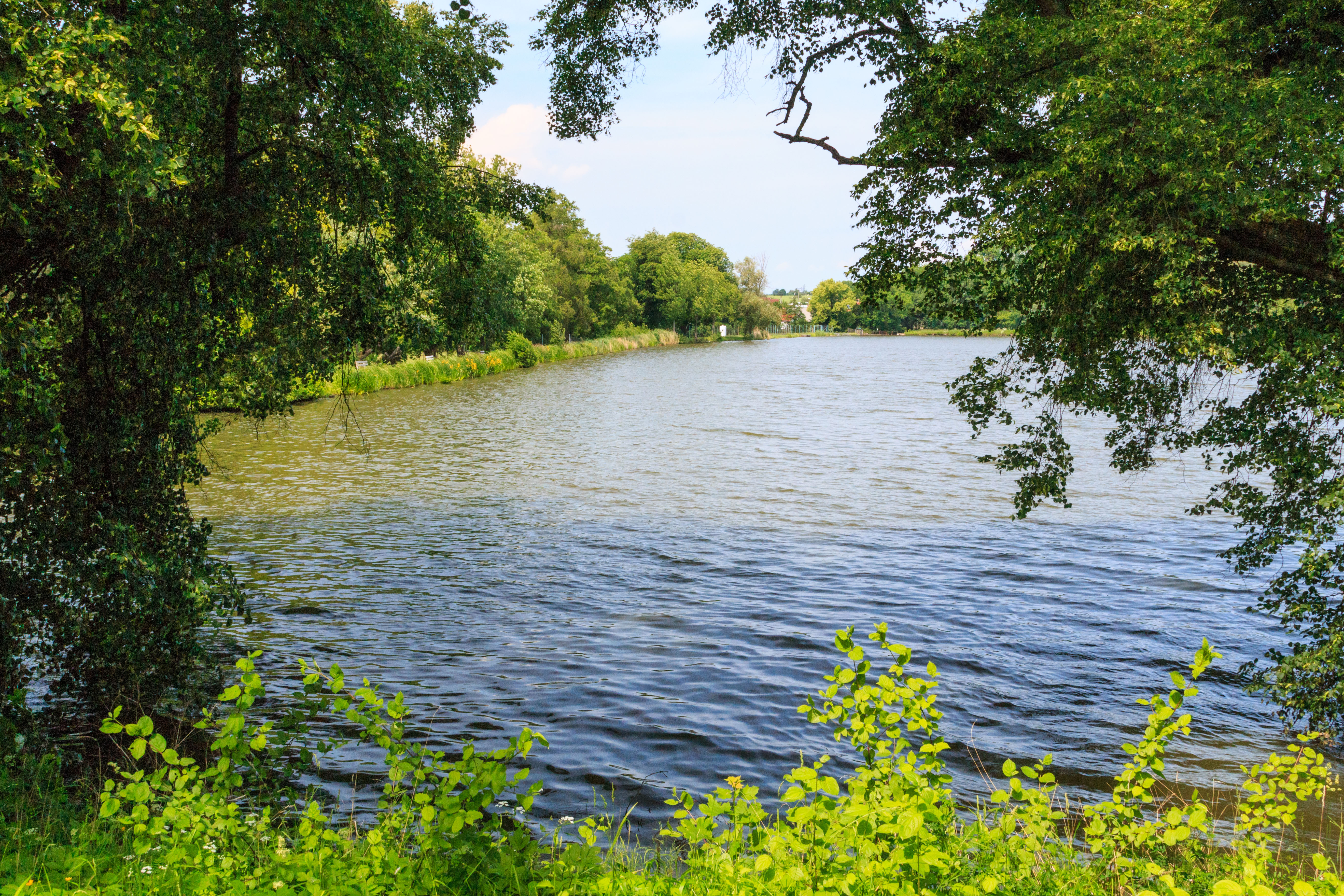 Zámecký rybník v Kopidlně Project: Vodstvo.